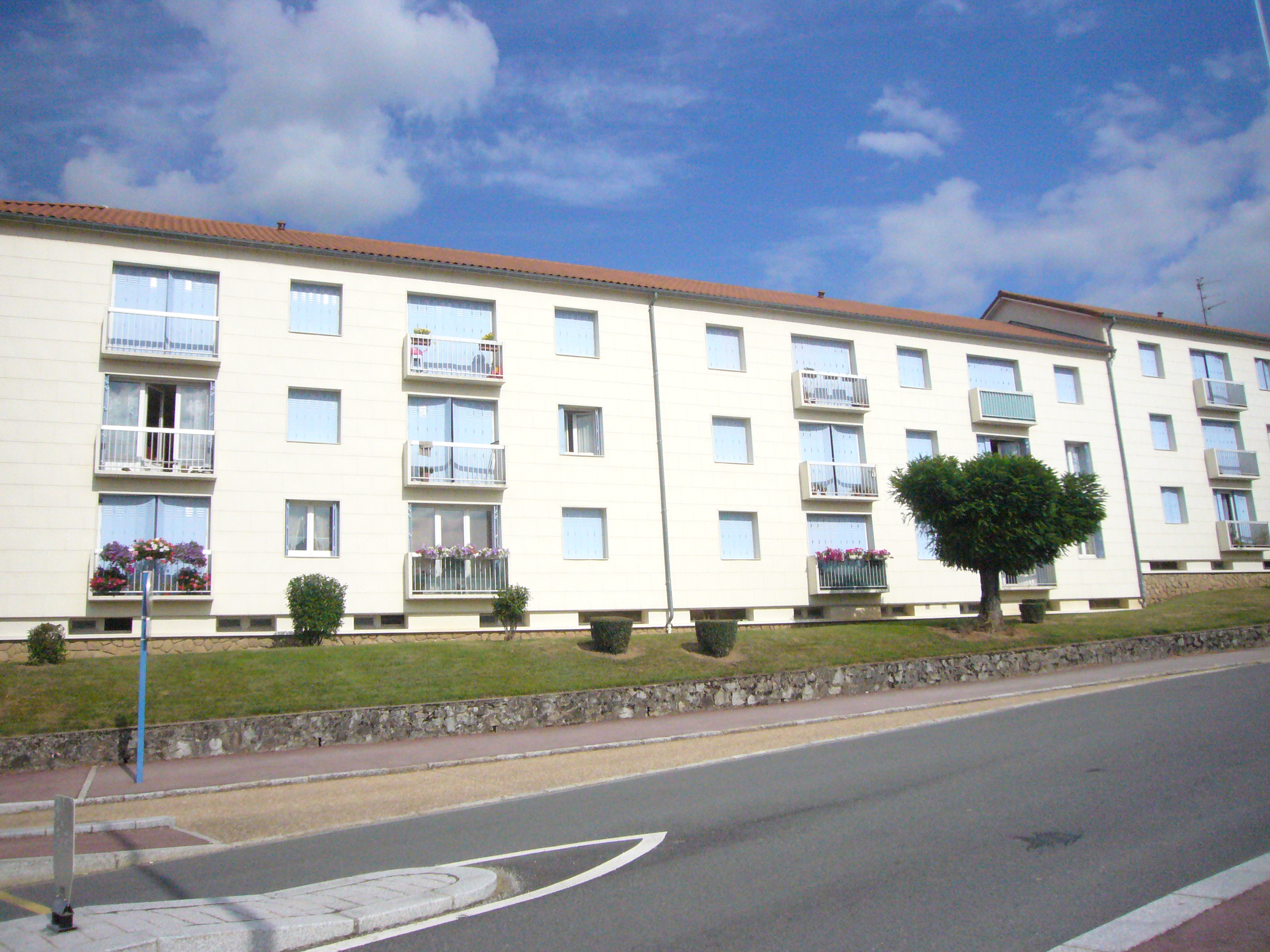 HLM à Panazol (Haute-Vienne)